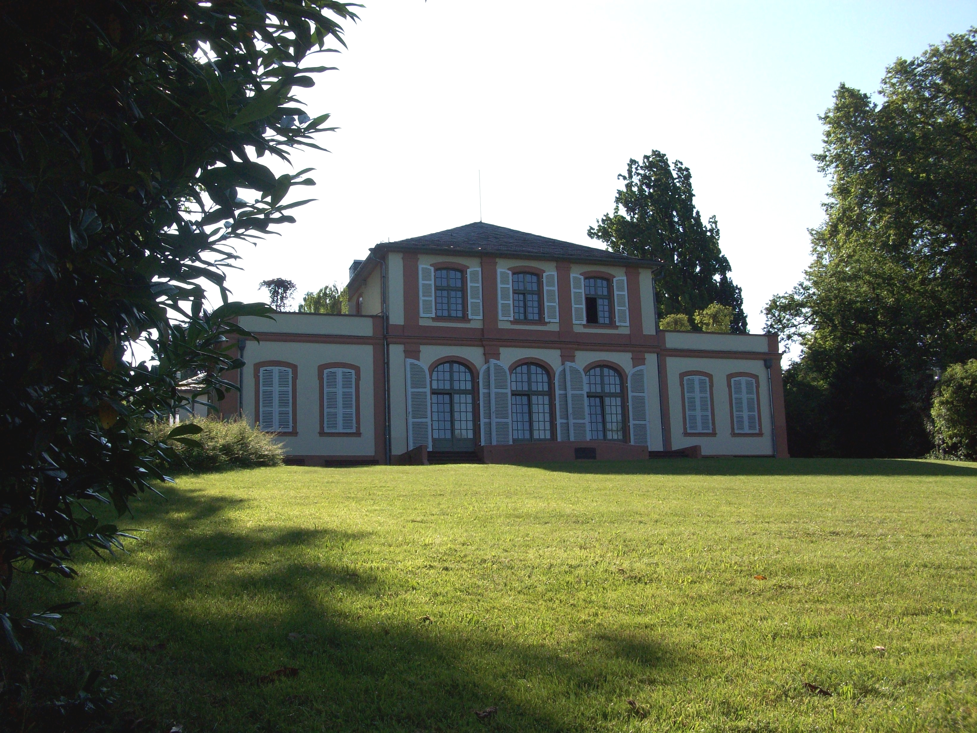 Das Prinz-Emil-Palais (Hauptansicht: Westansicht)